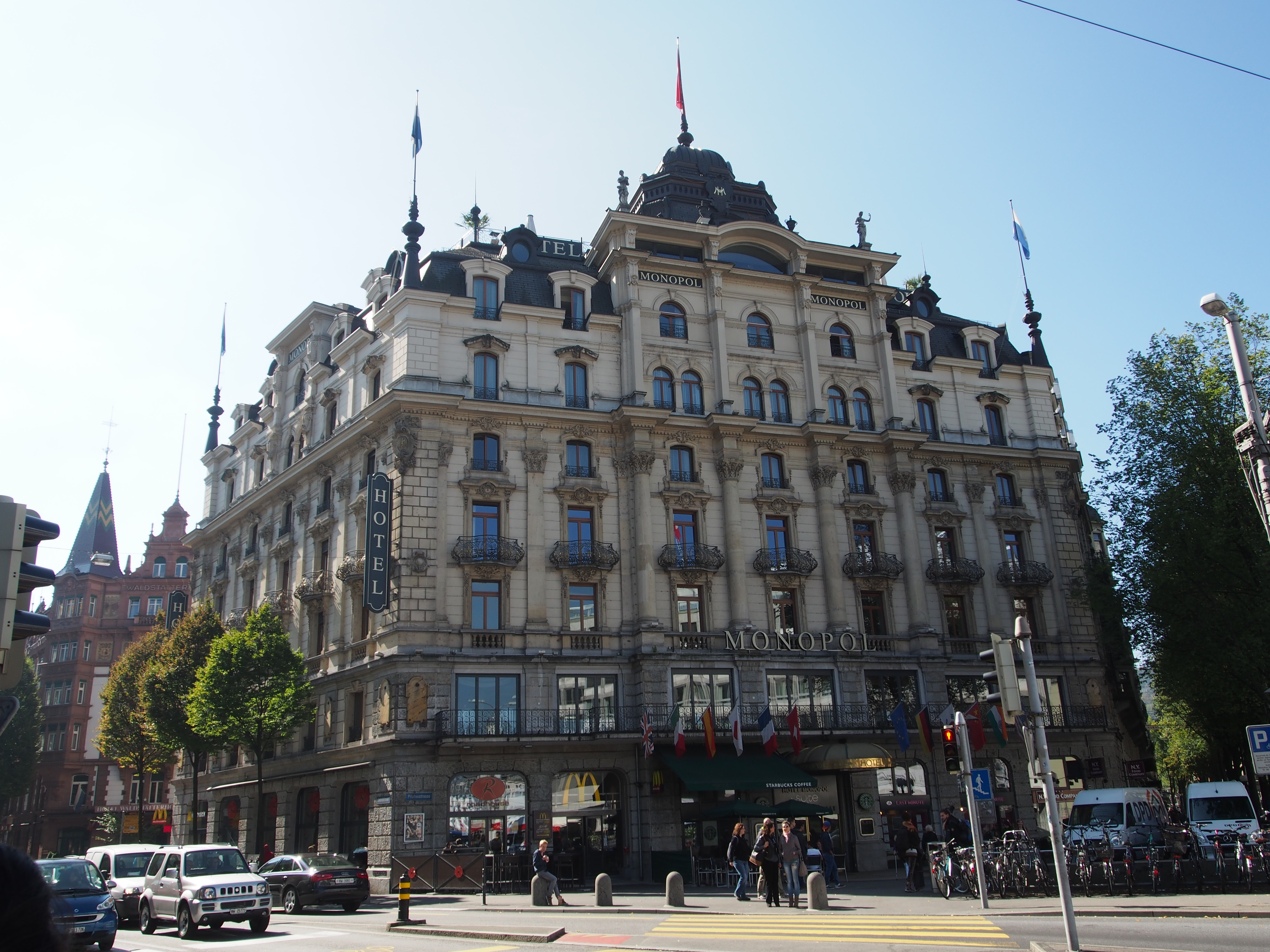 Hotel Monopol & Metropol